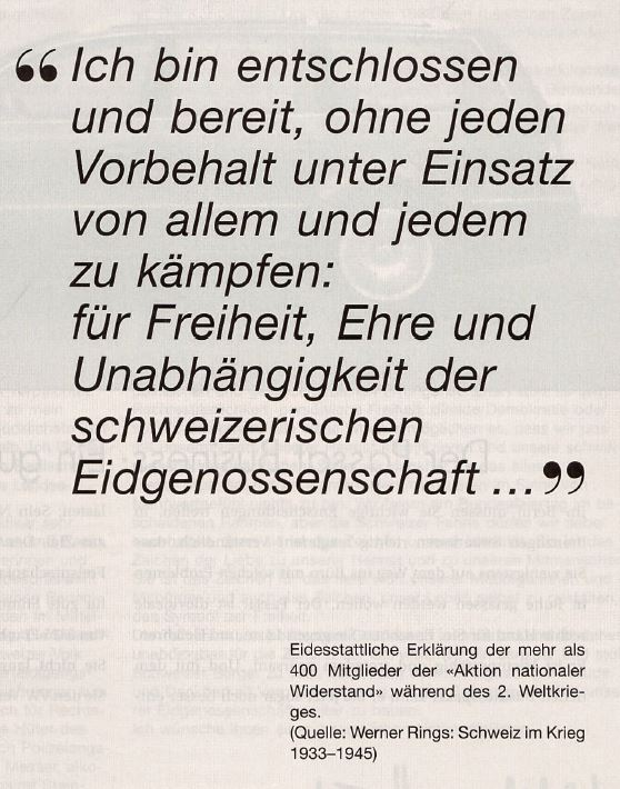 "Aktion nationaler Widerstand" 1940-1945, Beitrittserklärung, Schweiz